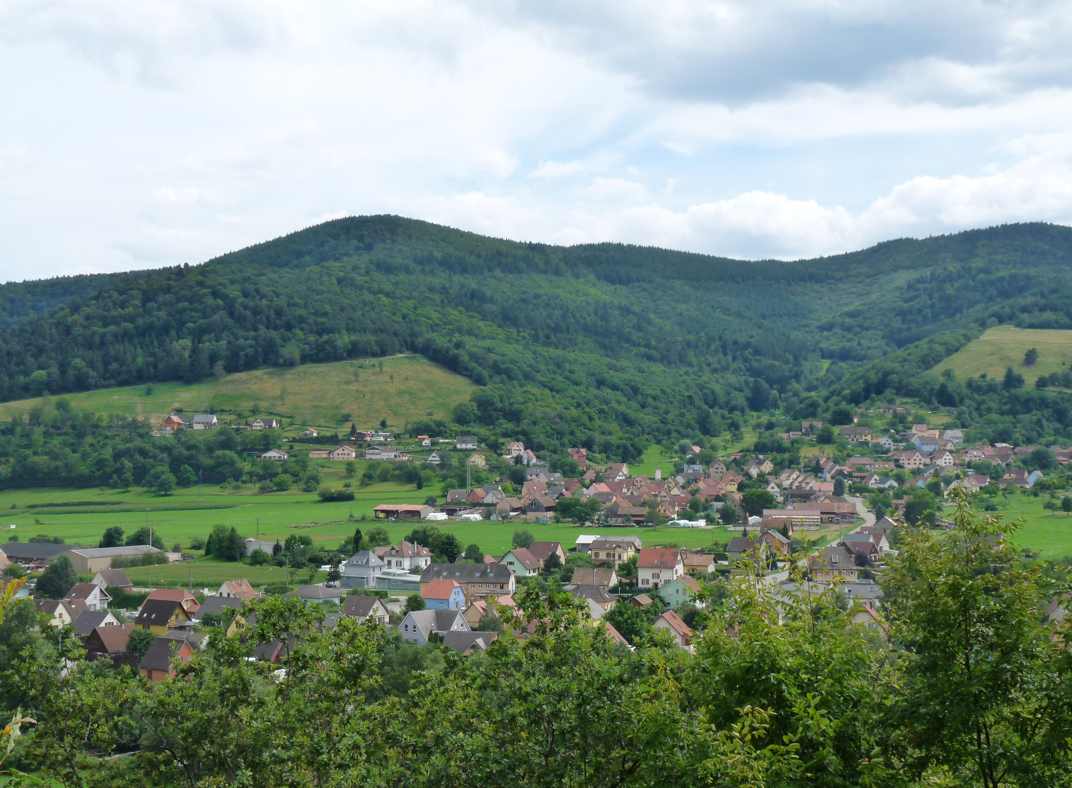 Griesbach-au-Val, vu depuis le monument Albert-Schweitzer de Gunsbach (Haut-Rhin)